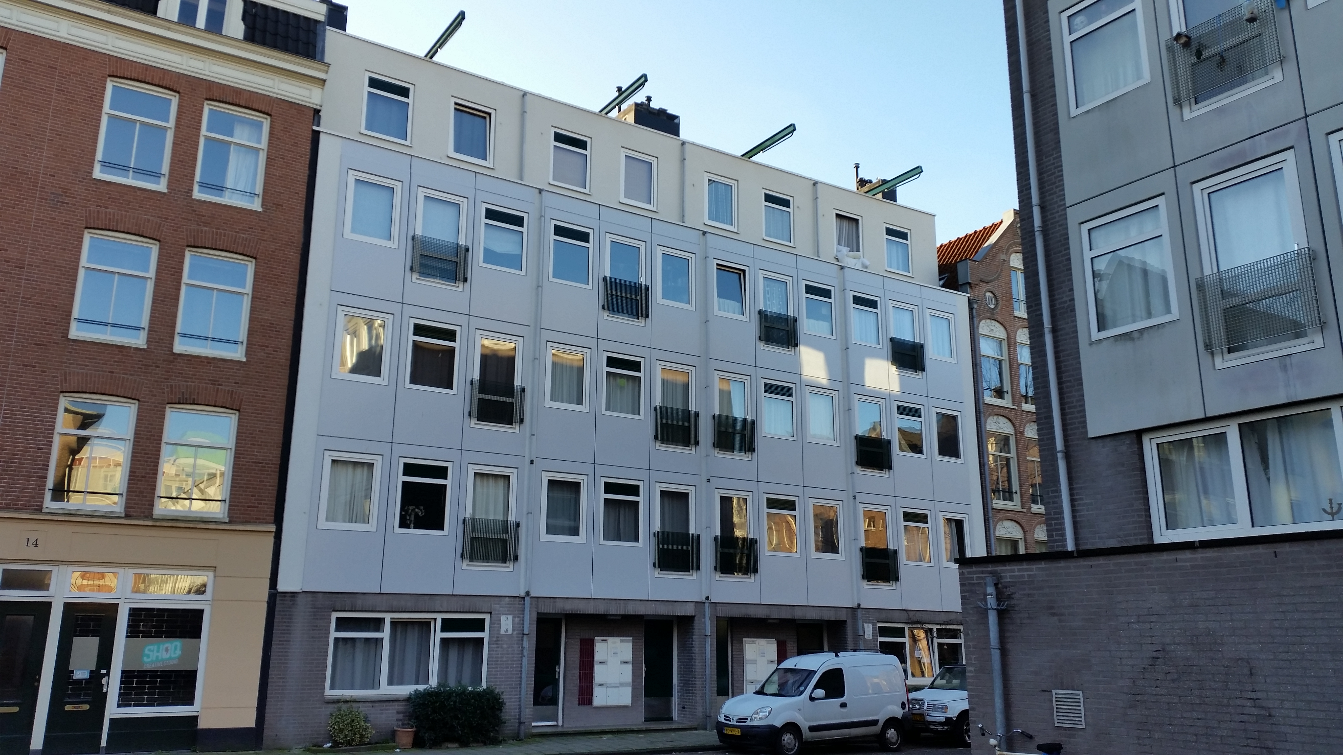 Deymanstraat 20-46, Amsterdam